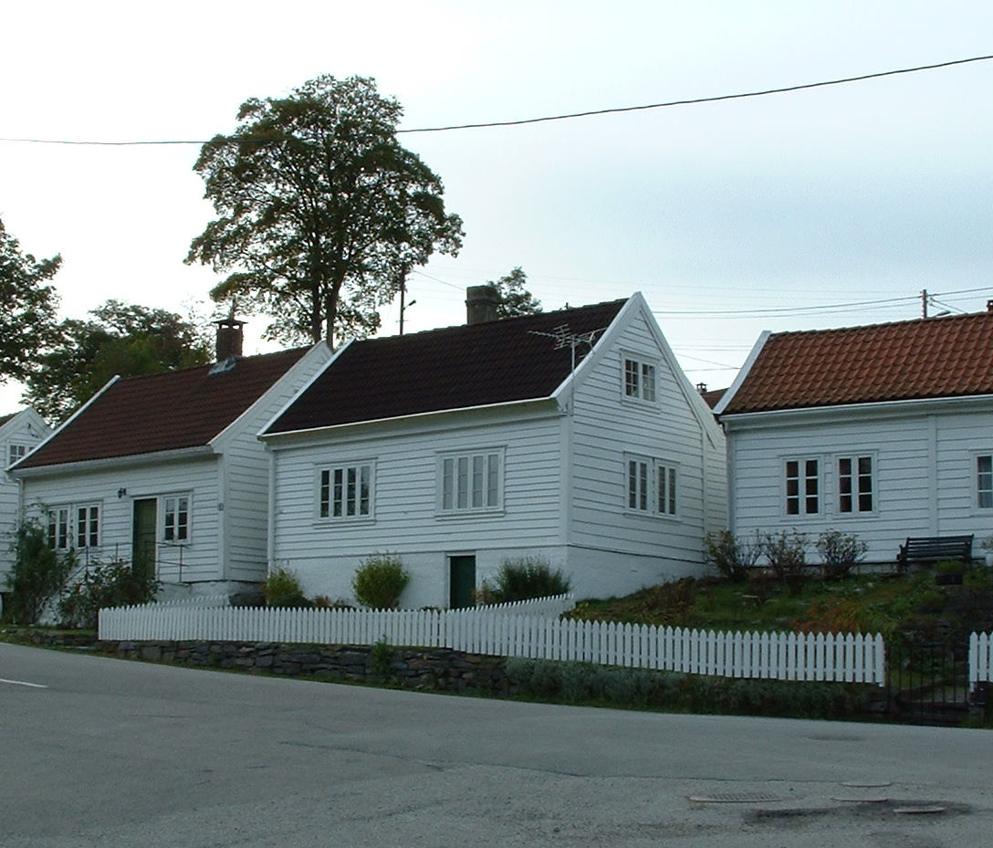 Idyllisk småhusbebyggelse i Alvøen. Disse husene var opprinnelig arbeiderboliger for ansatte ved Alvøen papirfabrikk.